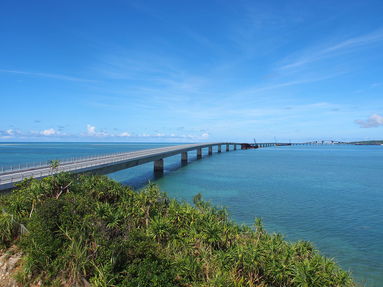 伊良部大橋（沖縄県宮古島伊良部大橋見学ステーションより）